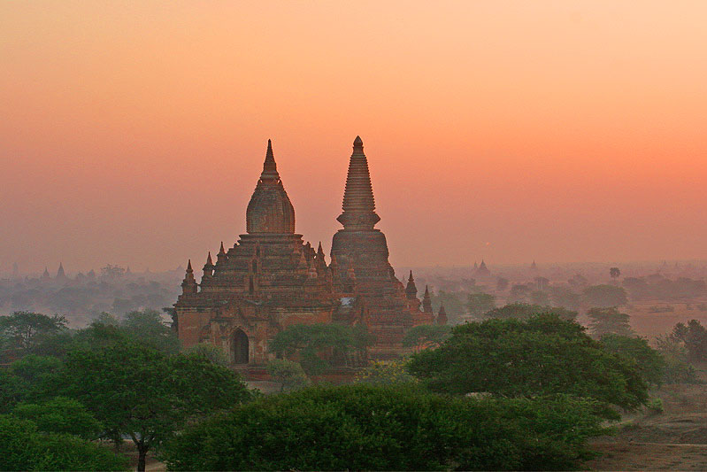 Bagan at sunrise, Myanmar